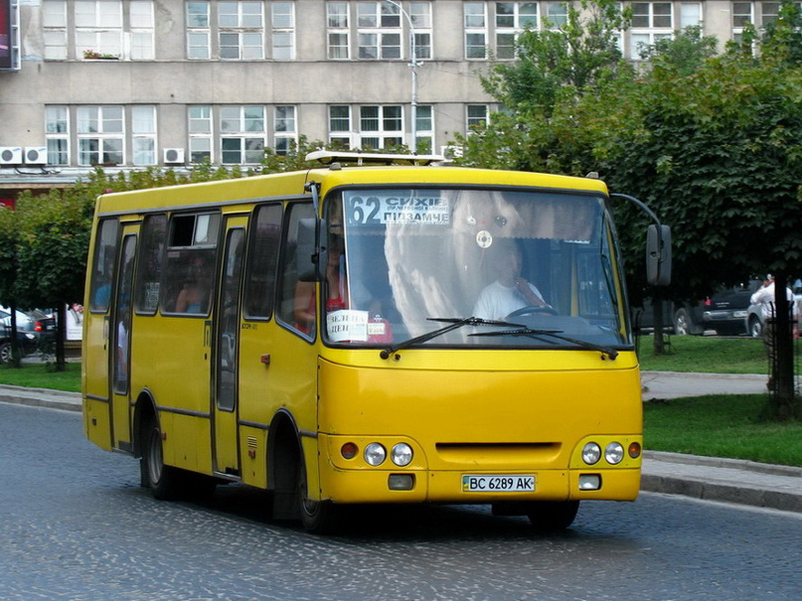 Богдан-А092 проспект Шевченка.jpg: Богдан А092 на проспекті Шевченка у Львові